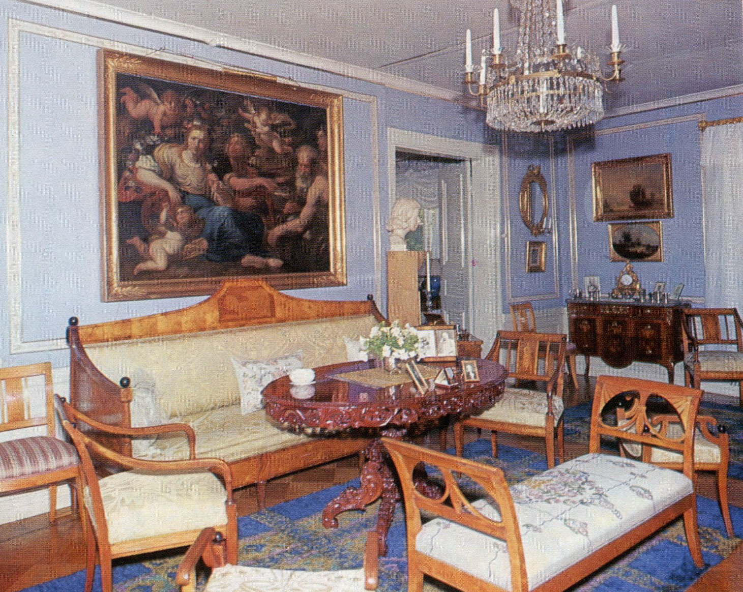 Torsvi gårds salong